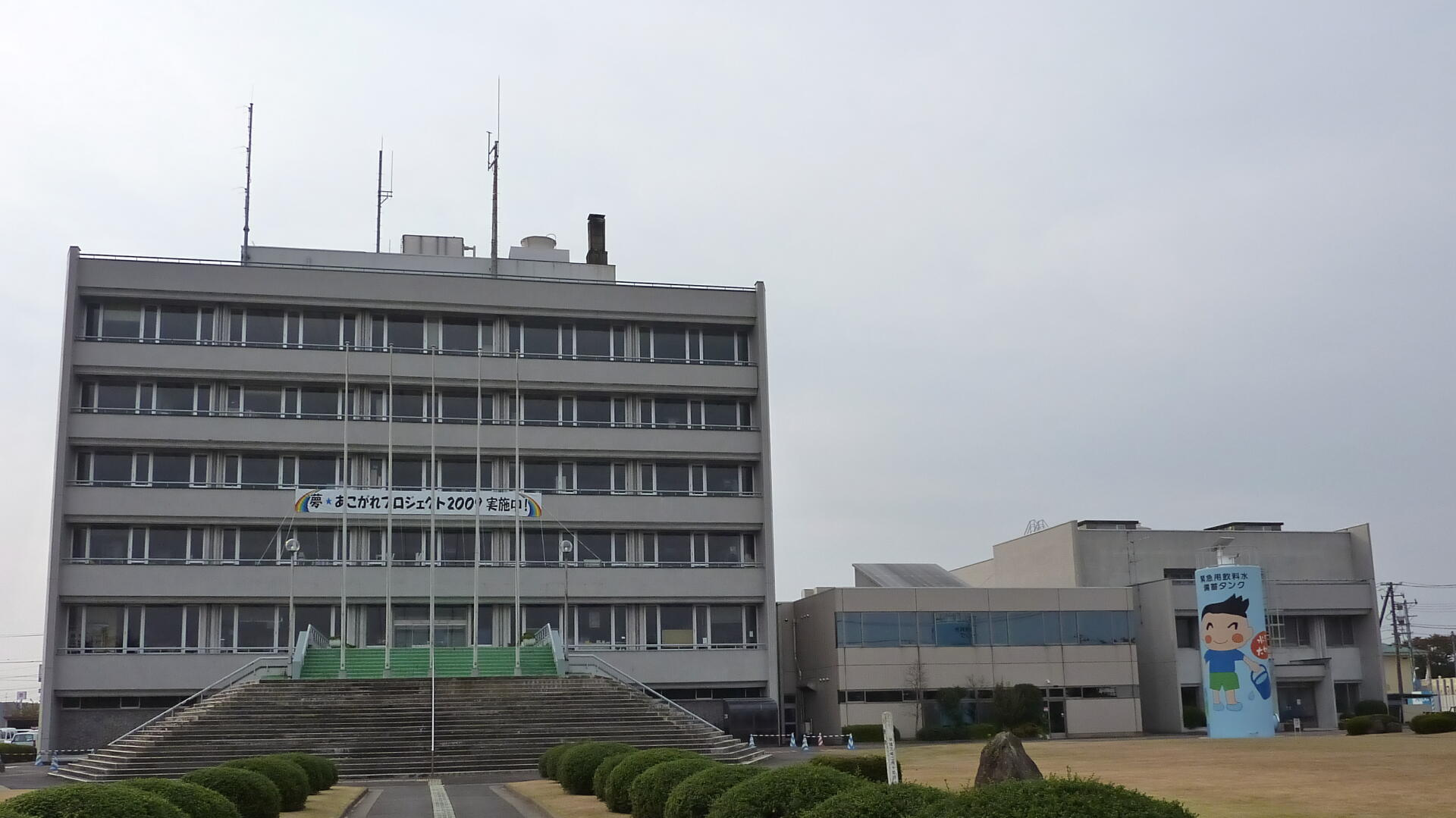 岩沼市役所